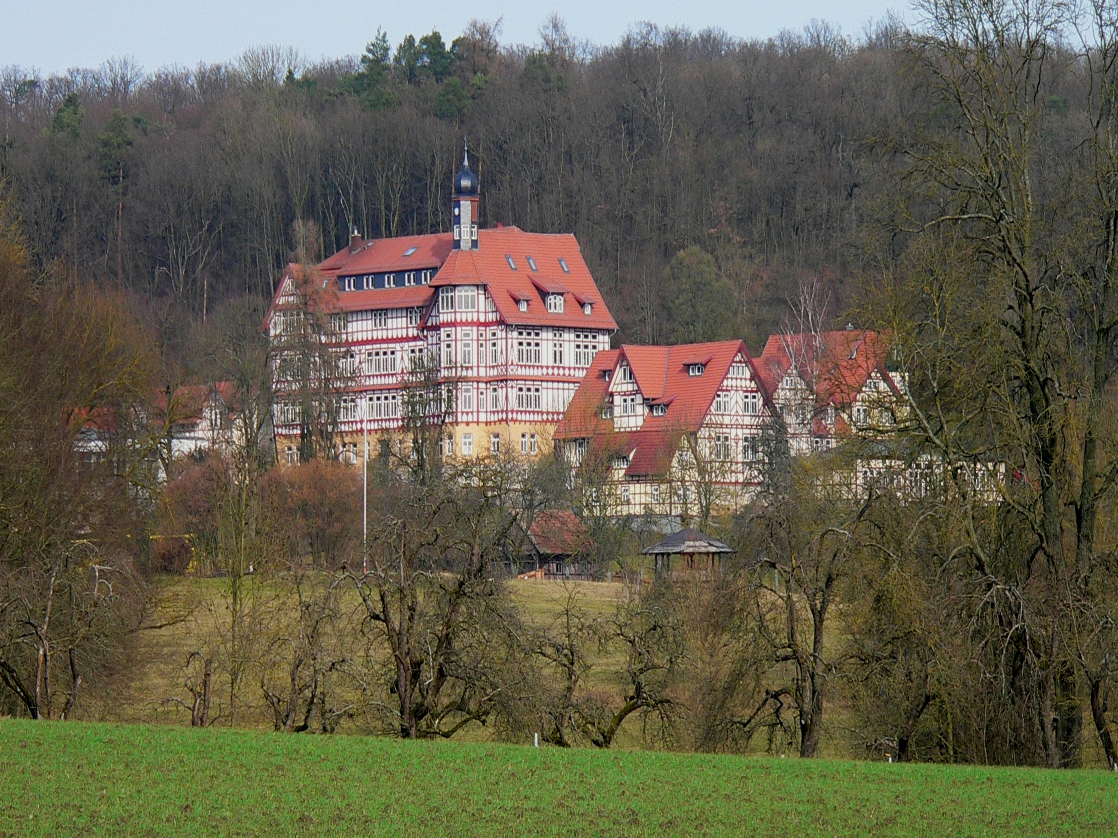 Hermann-Lietz-Schule in Haubinda (Landkreis Hildburghausen, Thüringen, Deutschland) - Gesamtansicht